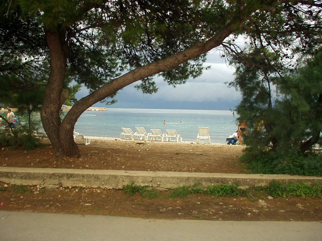 Petrčane - Chorvatsko